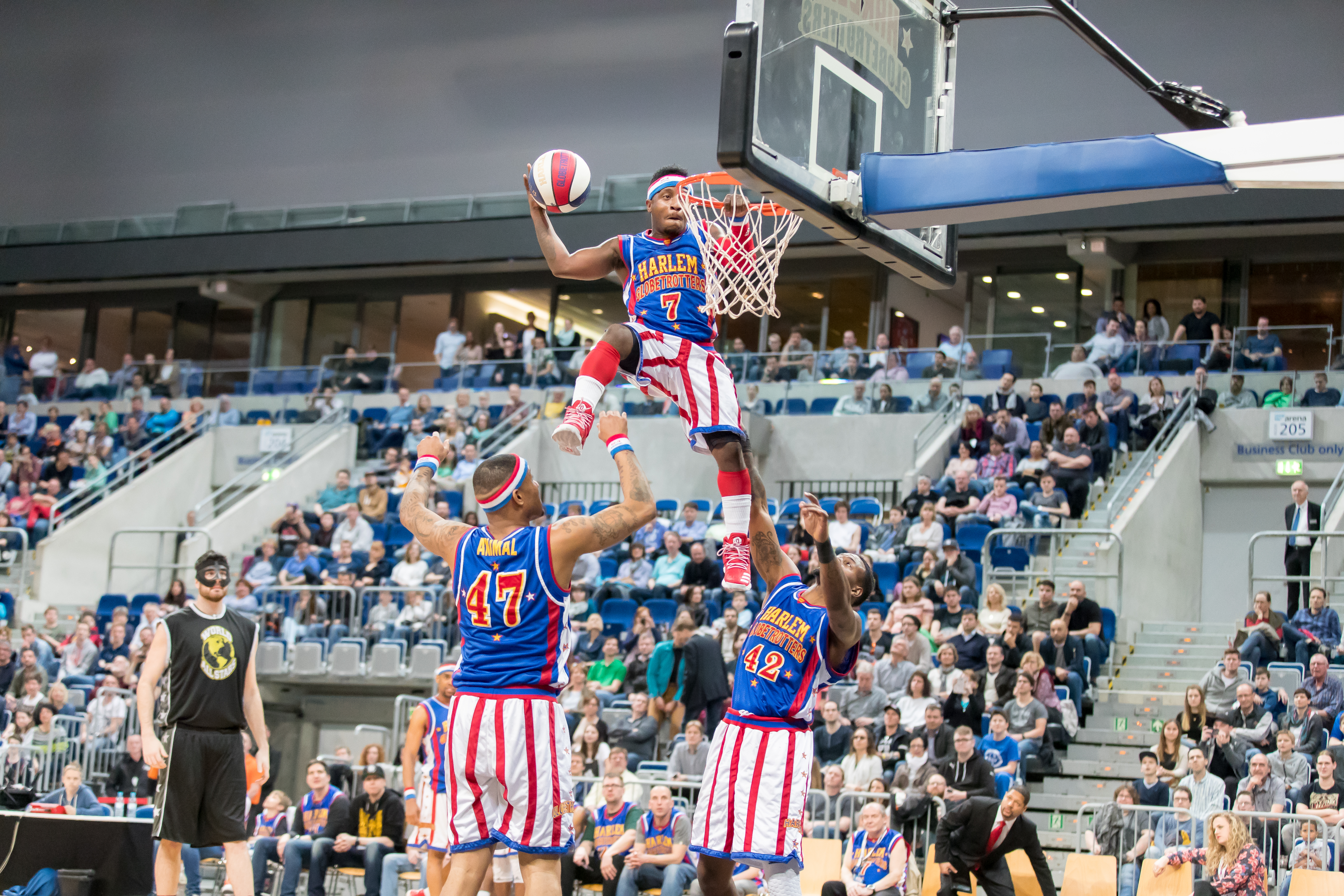 Harlem Globetrotters during Harlem Globetrotters at SAP Arena, Mannheim, Baden-Württemberg, Germany on 2017-03-27, Photo: Sven Mandel